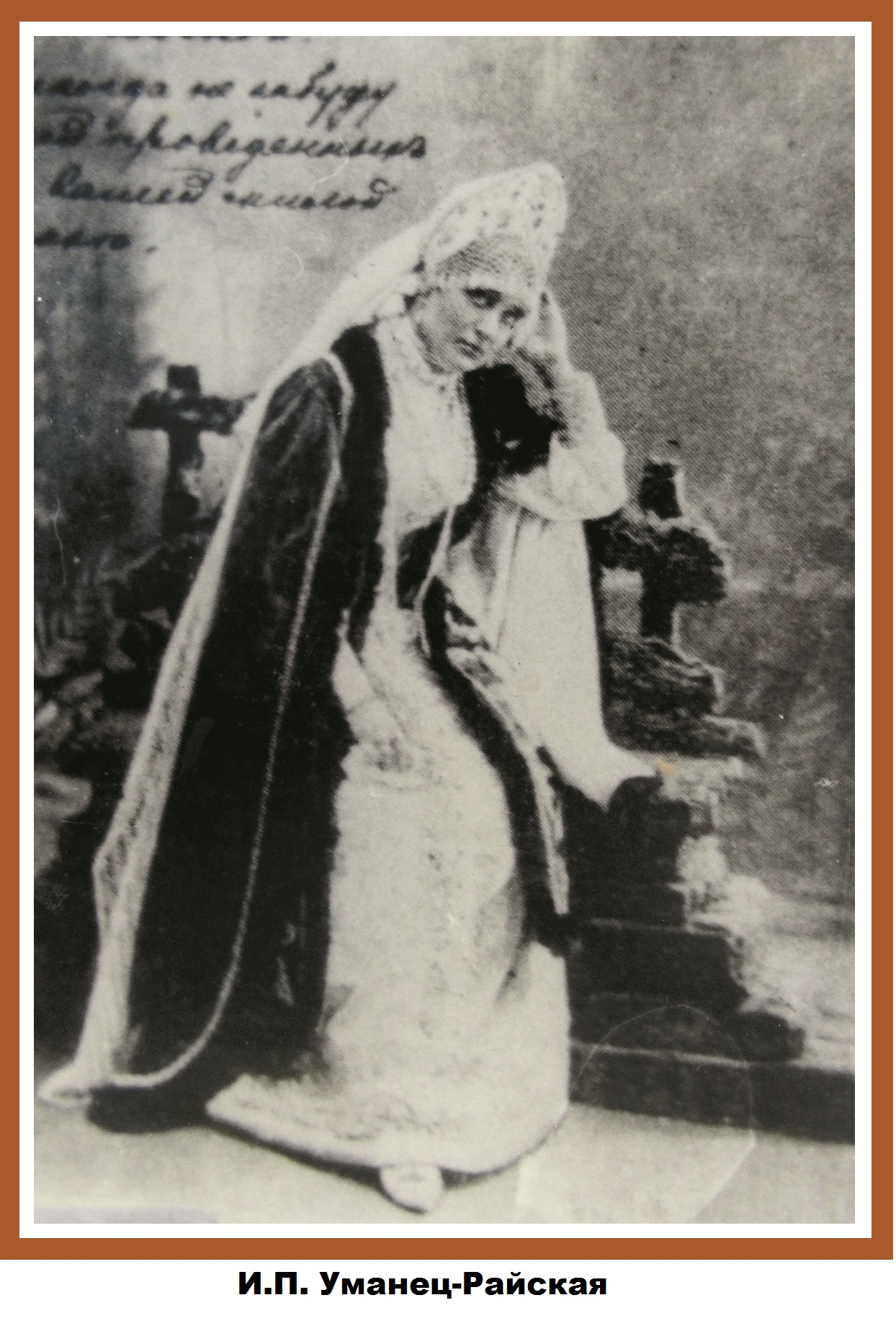 Фотография из коллекция музея г. Ирбита, где актриса выступала до 1881 г. (т.е. до поступления в Малый театр г. Москва (в конце 1881 г.) Поэтому фотография датируется не позднее 1881 г.